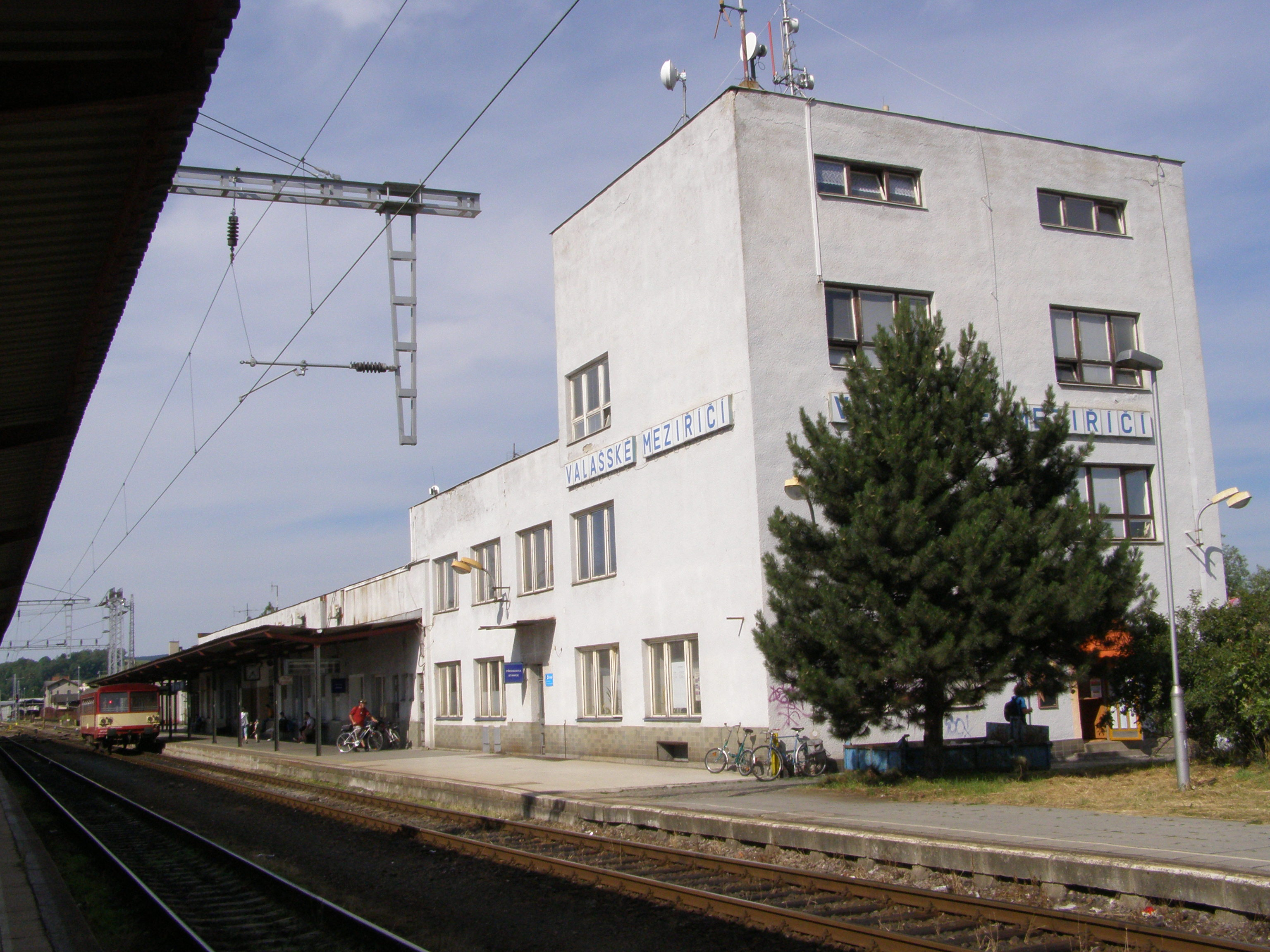 Valašské Meziříčí, železniční nádraží